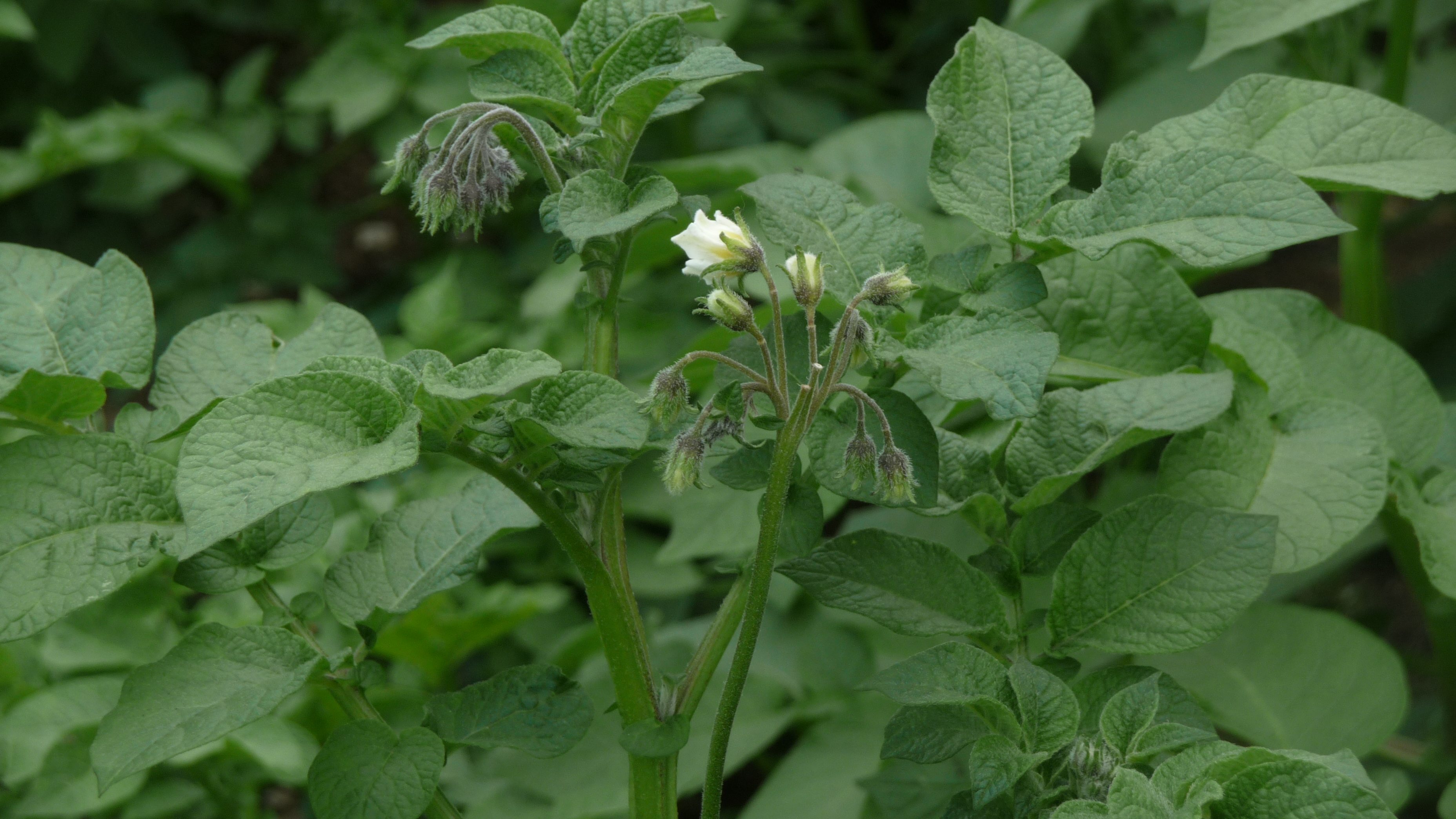 Plant de pomme de terre (Solanum tuberosum), variété Bintje, en fleurs.